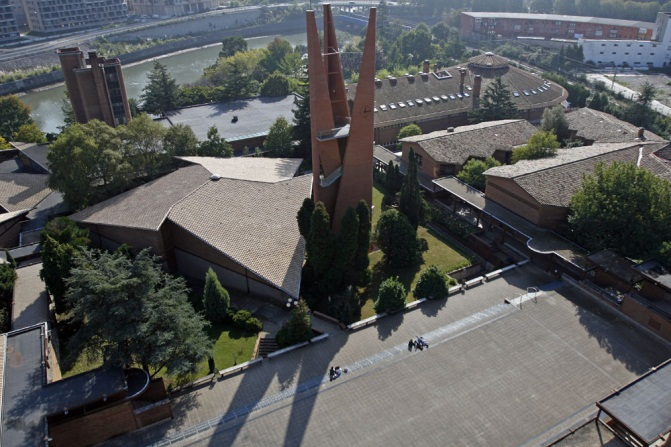 La Facultad de Ciencias Económicas y Empresariales de la Universidad de Deusto, campus de San Sebastián